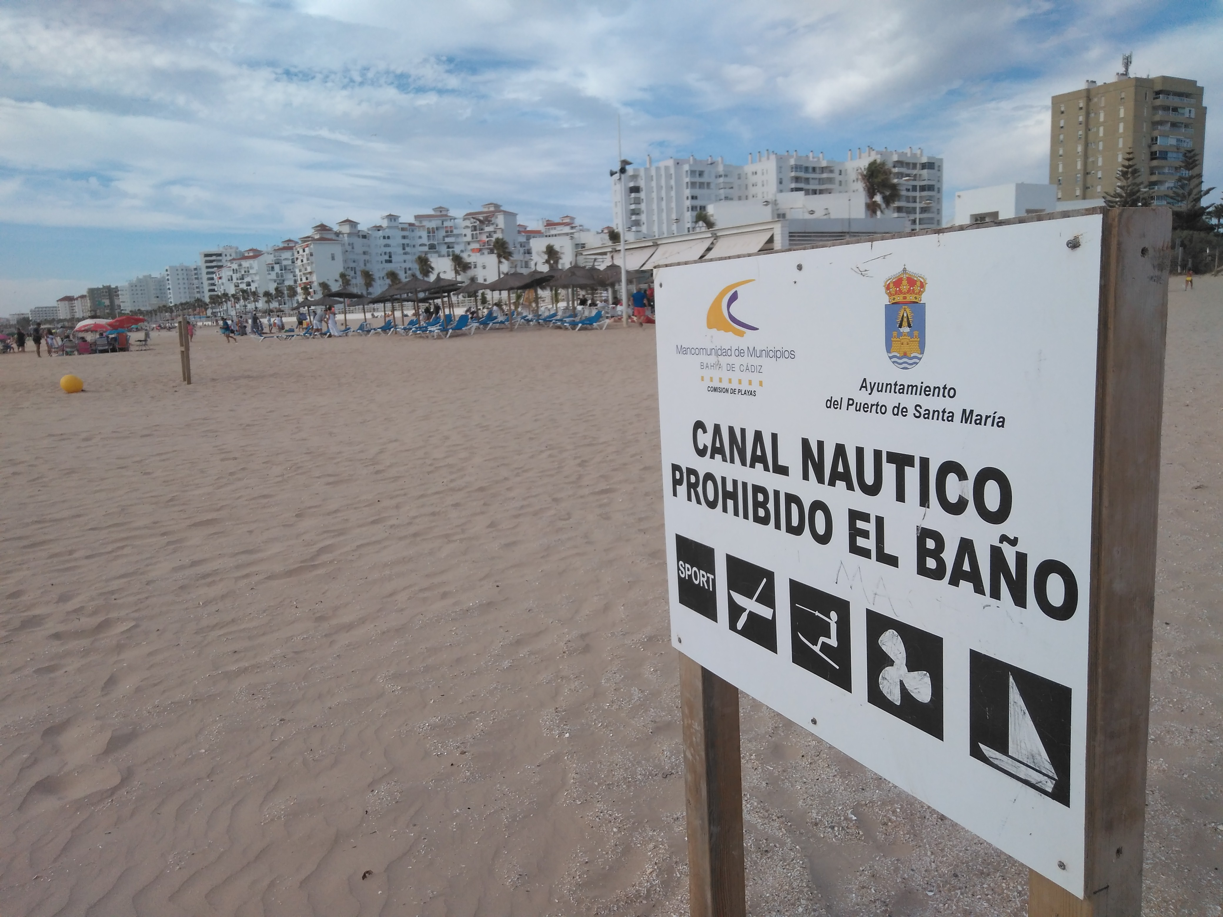 Cartel en playa de Valdelagrana (El Puerto de Santa María, España)